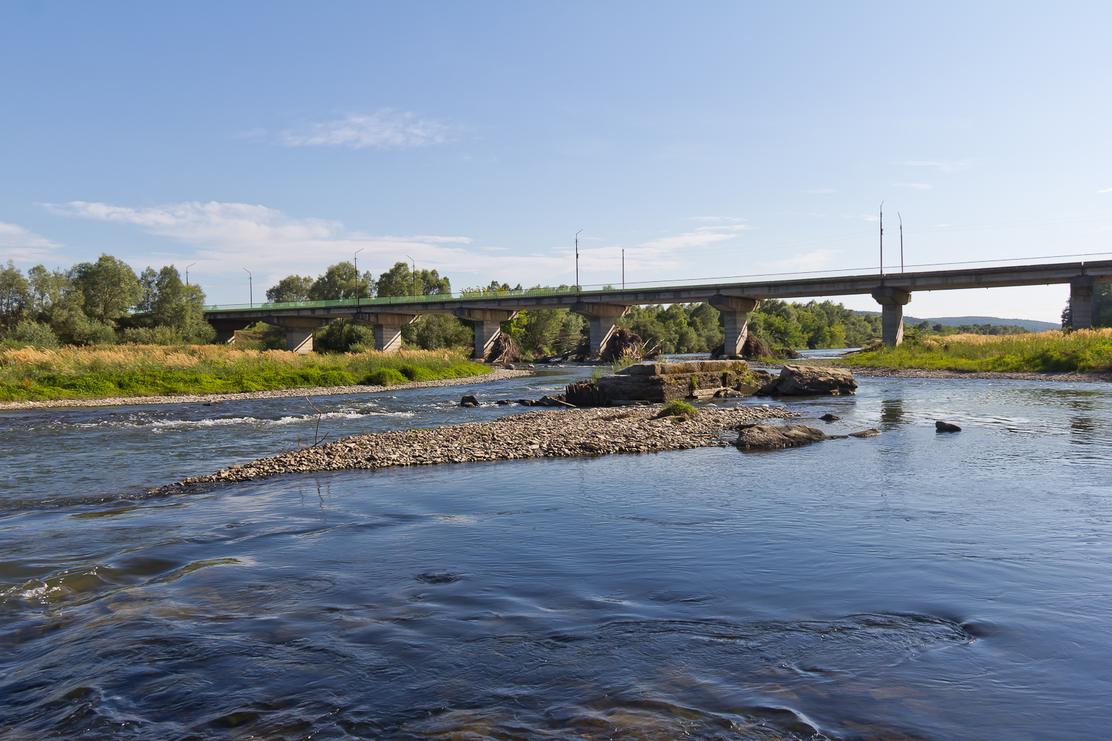 Bystrytsia River near Yezupil, Tysmenytsia Raion of the Ivano-Frankivsk Oblast